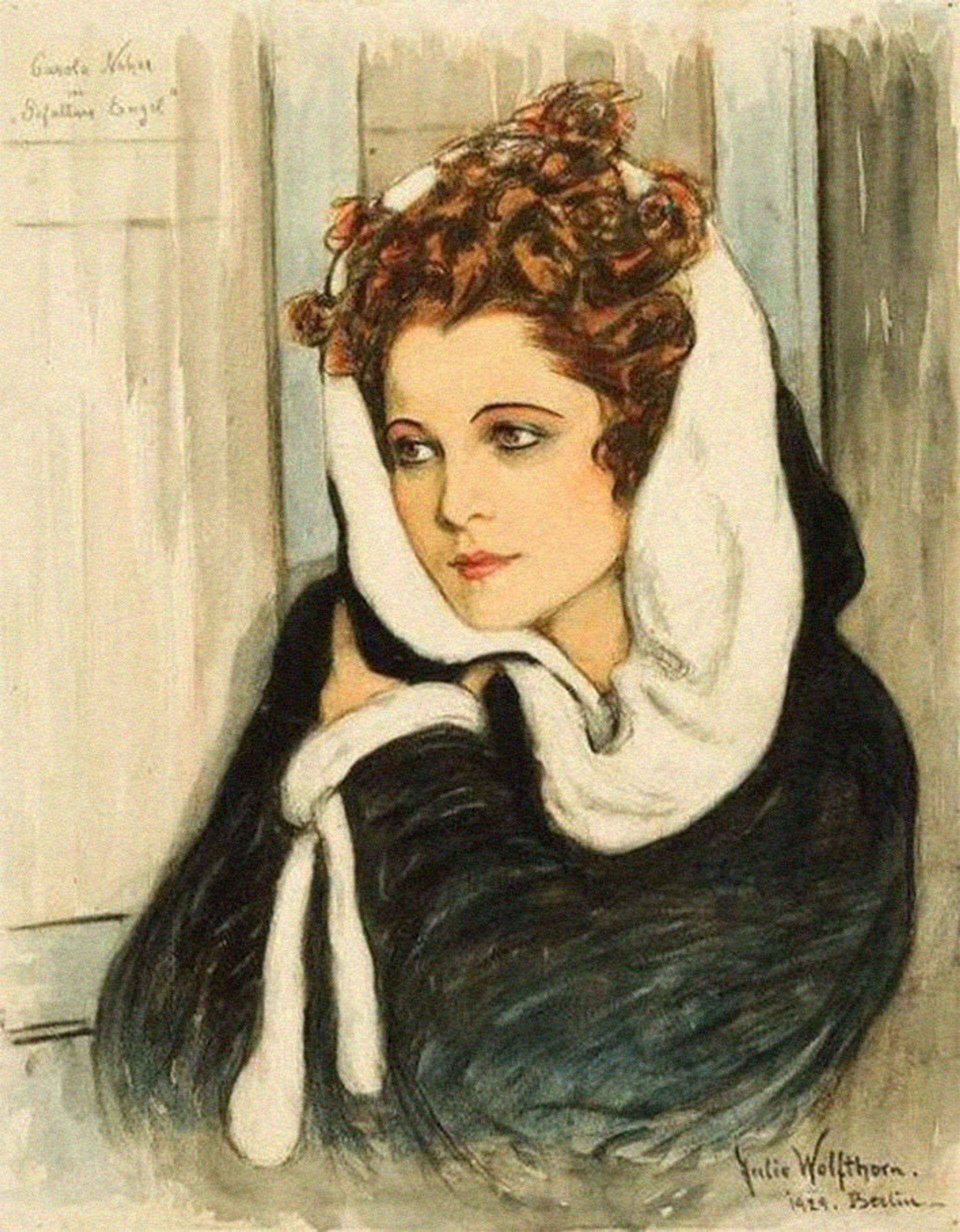 Julie Wolfthorn: Carola Neher in "Gefallene Engel" von Noel Coward, 1929 im Theater am Schiffbauerdamm, Berlin